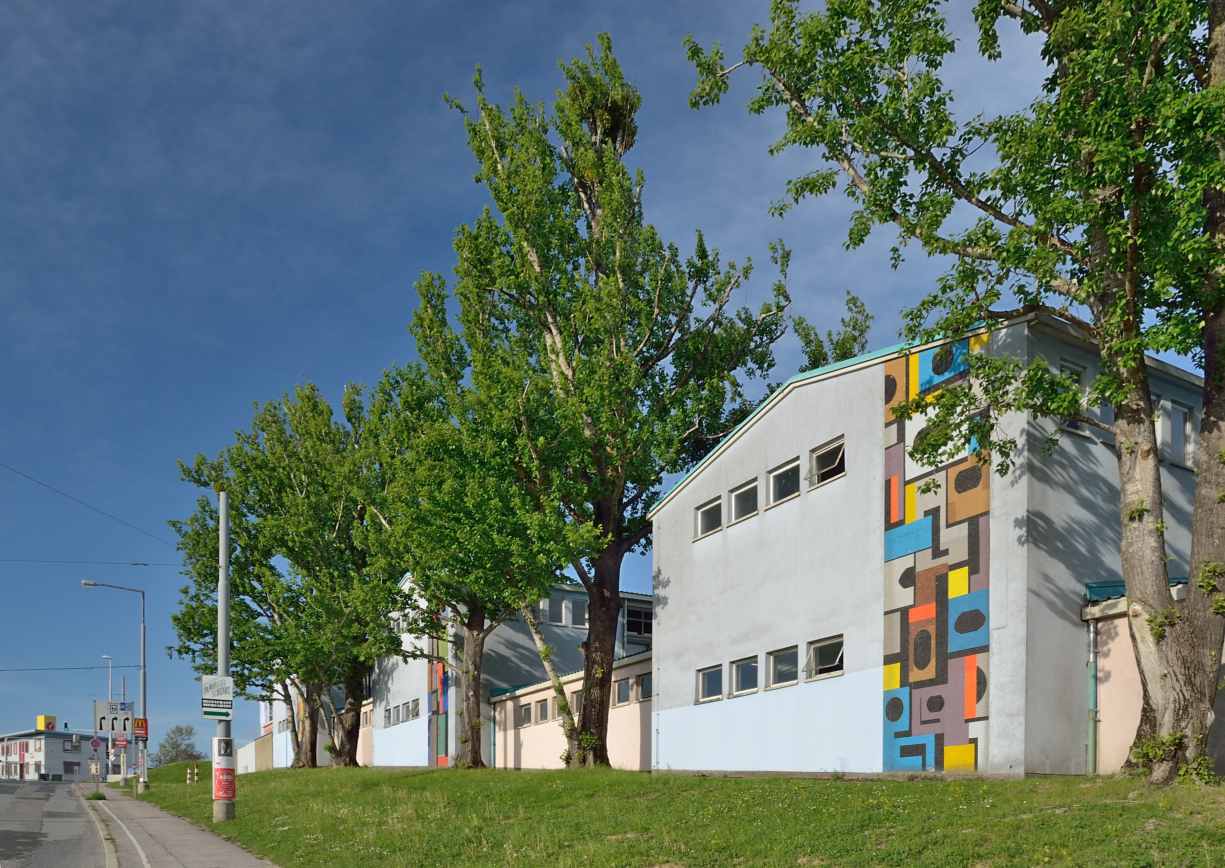 Mosaik an der Außenseite der Kabinen- / Kästchentrakte des Laaerbergbades in Wien Favoriten, zur Favoritenstraße.